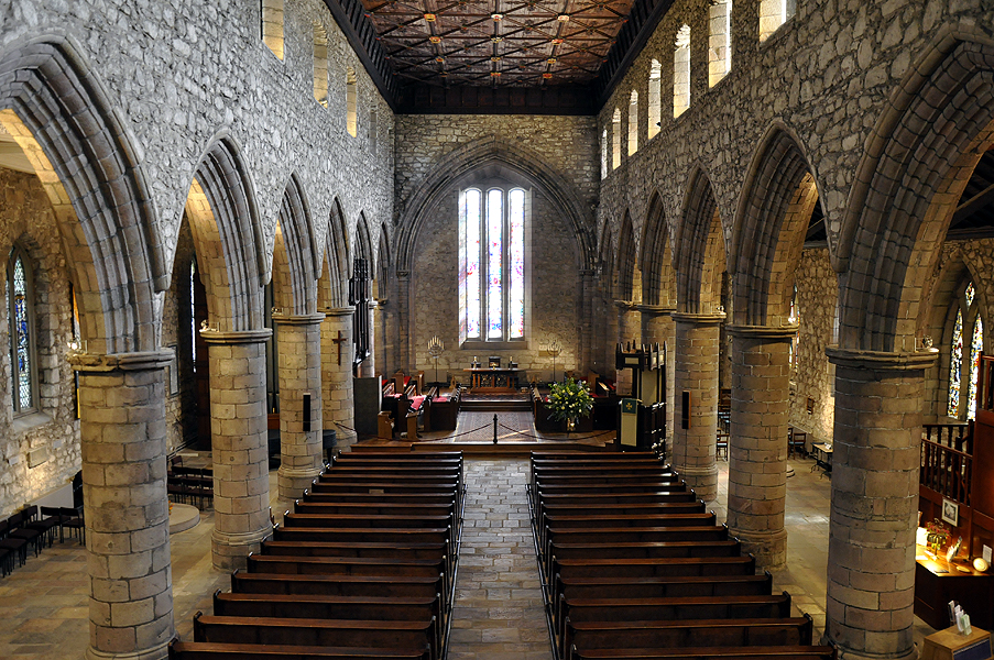 St Machar's Cathedral, Aberdeen, Scotland